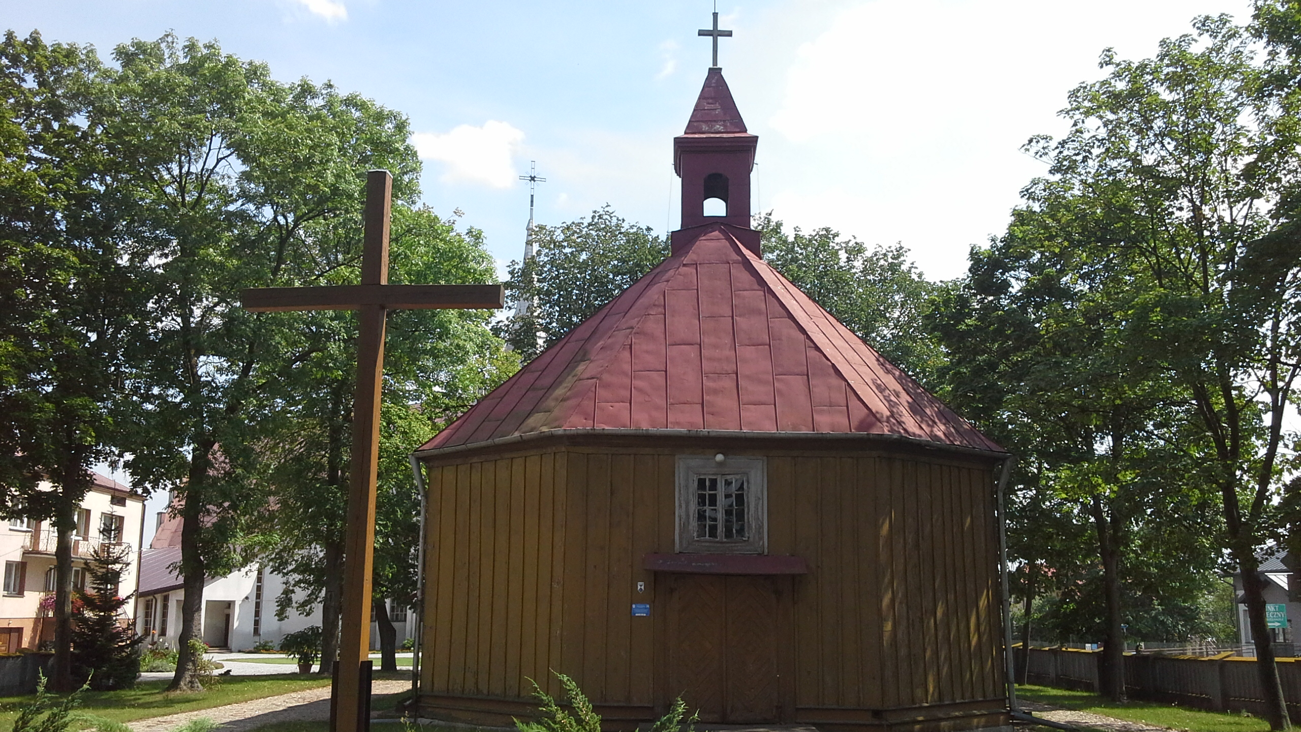 Była cerkiew unicka i prawosławna, następnie kościół Wniebowzięcia NMP w Grodzisku